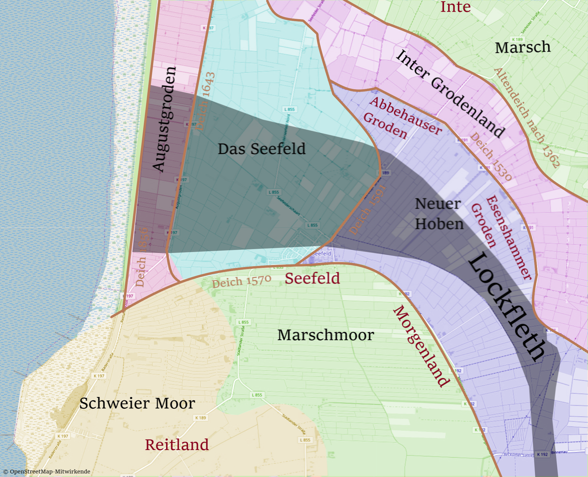 Landgewinnung bei Seefeld. Eingezeichnet ist das alte Flussbett des Lockfleth sowie die Groden und Deichlinien.